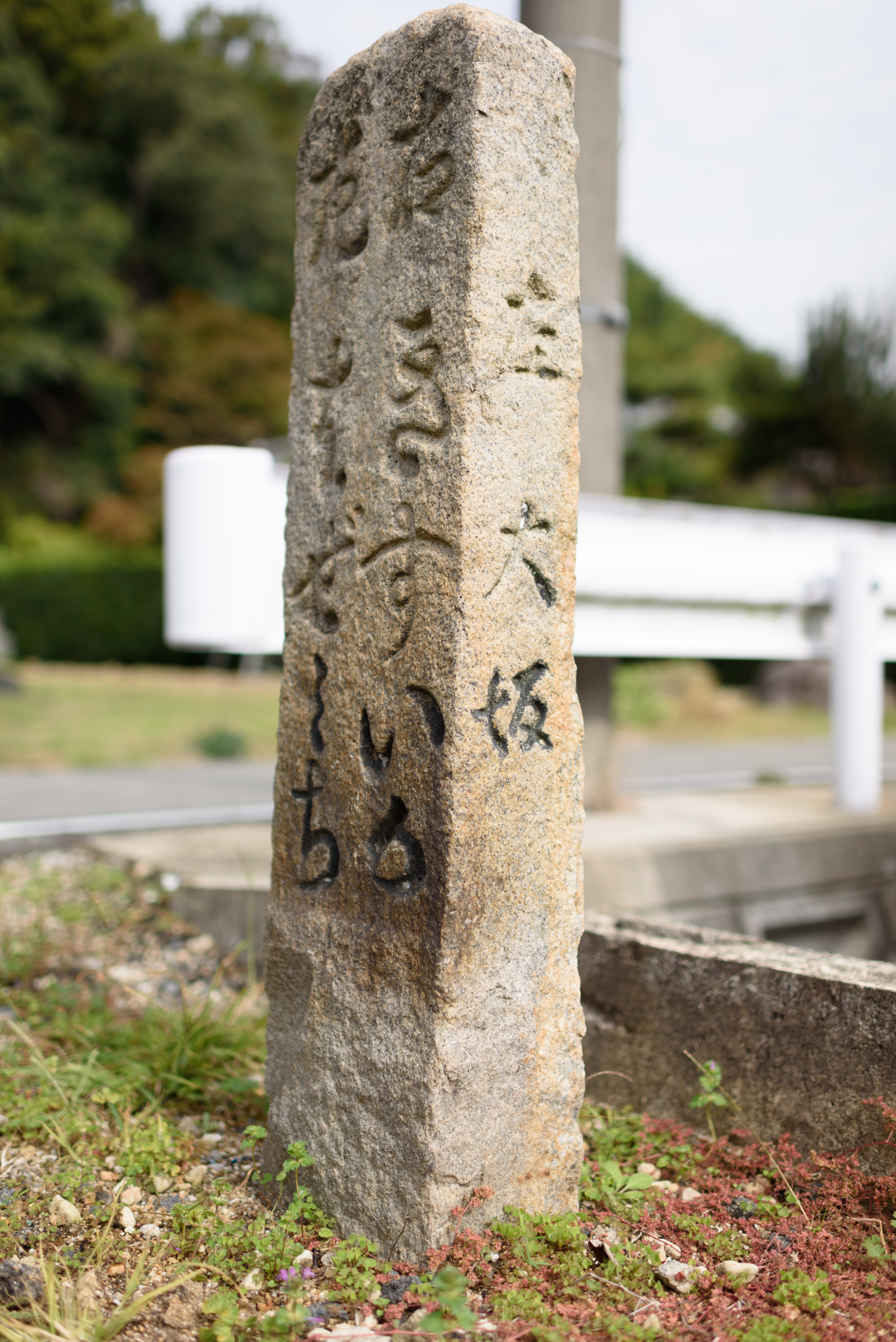 大坂道道標（京都府相楽郡精華町山田） 「左 はぜみち、右 きすいか、左 大坂」